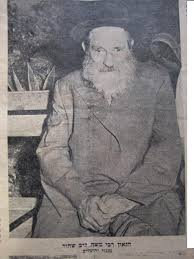 רבי משה לייב שחור